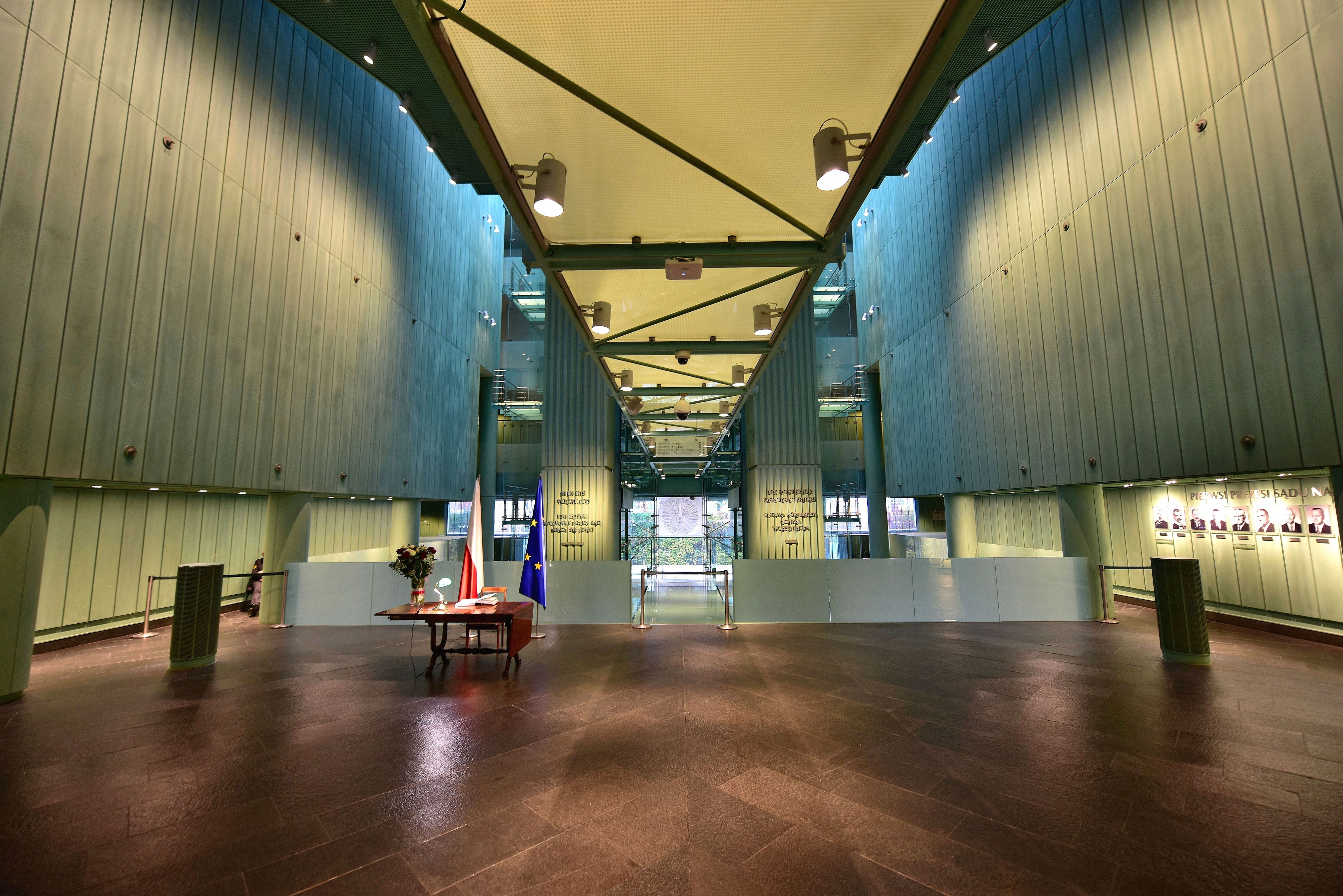 Hol główny w gmachu Sądu Najwyższego w Warszawie